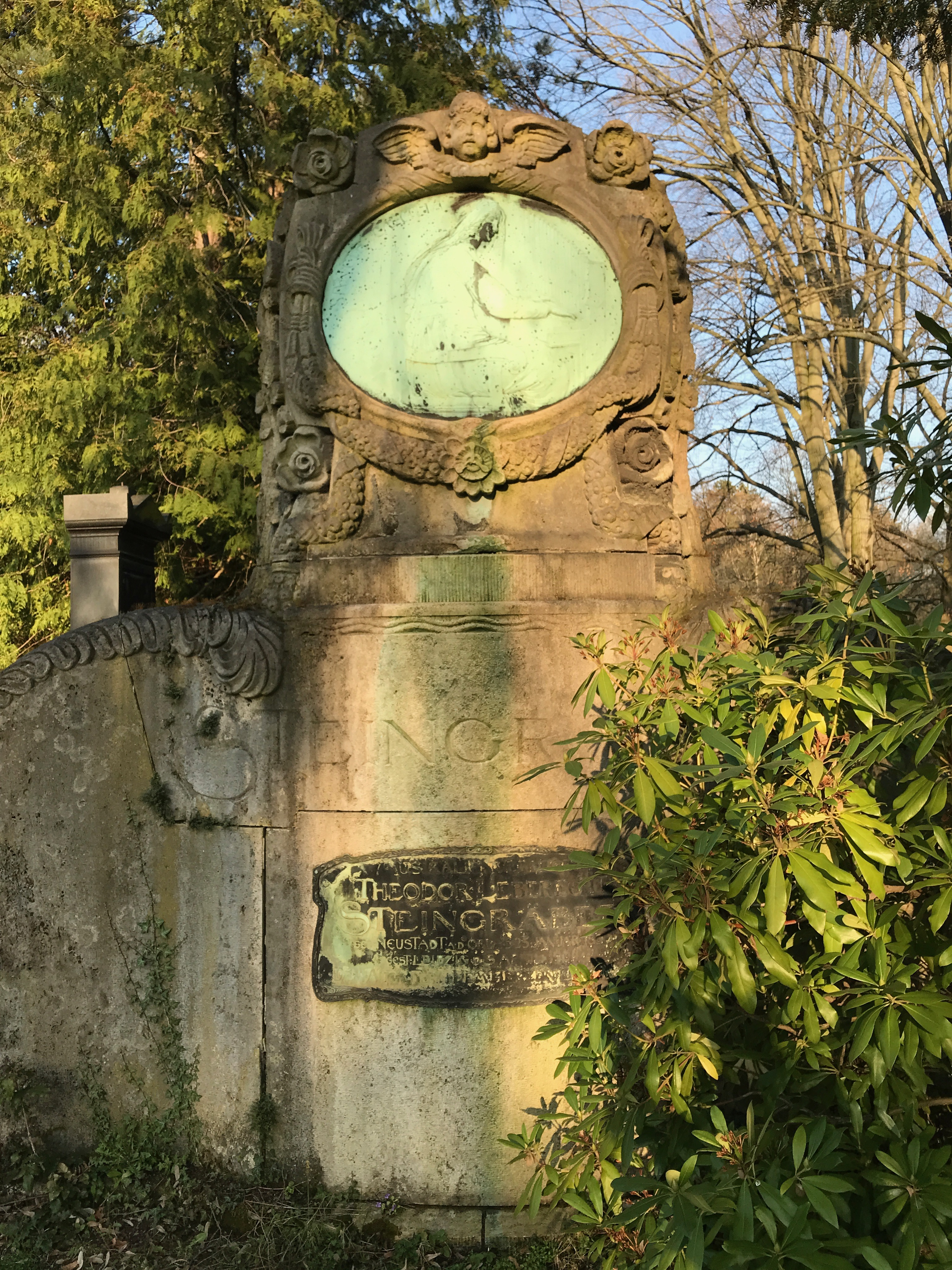 Grabanlage Theodor Leberecht Steingräber auf dem Südfriedhof in Leipzig